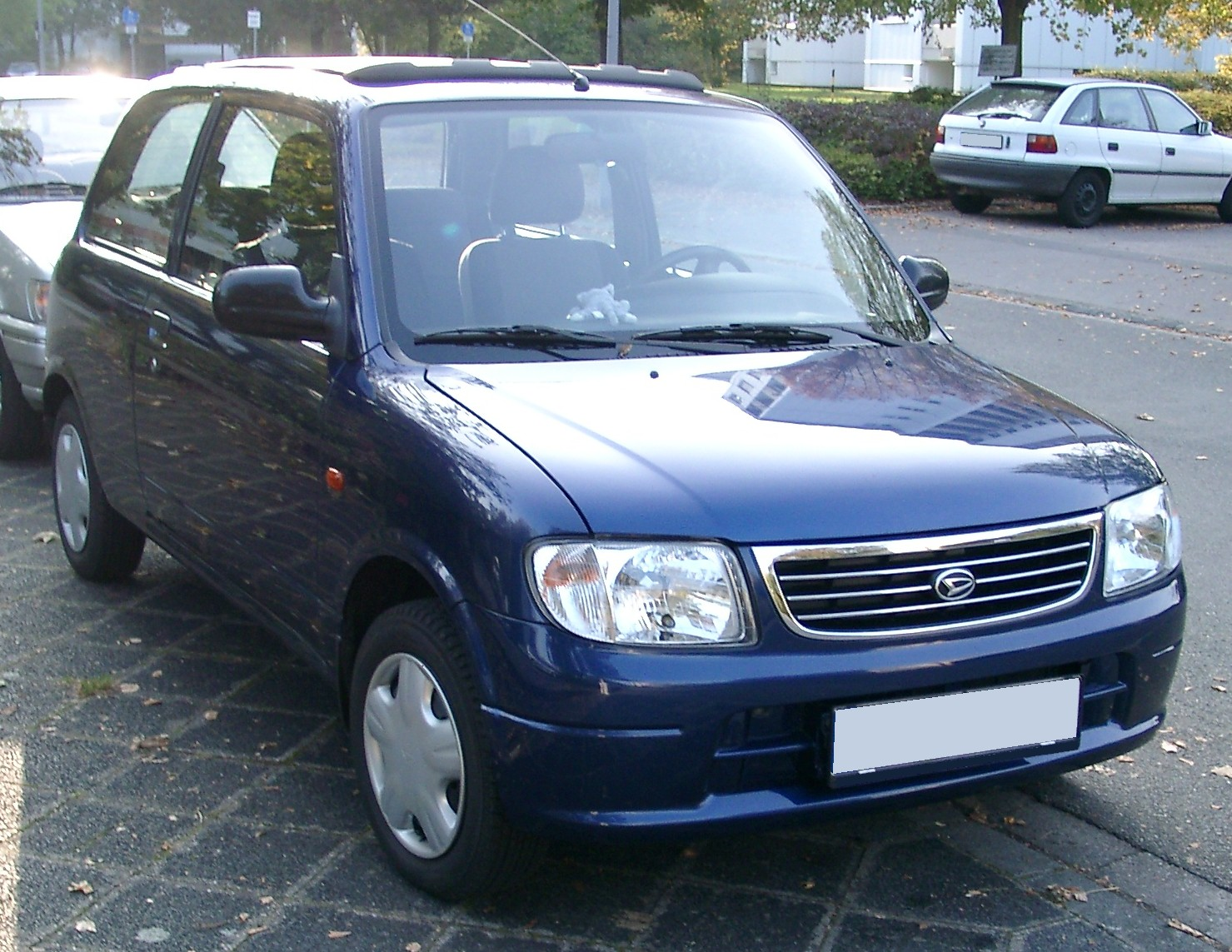 Daihatsu Cuore